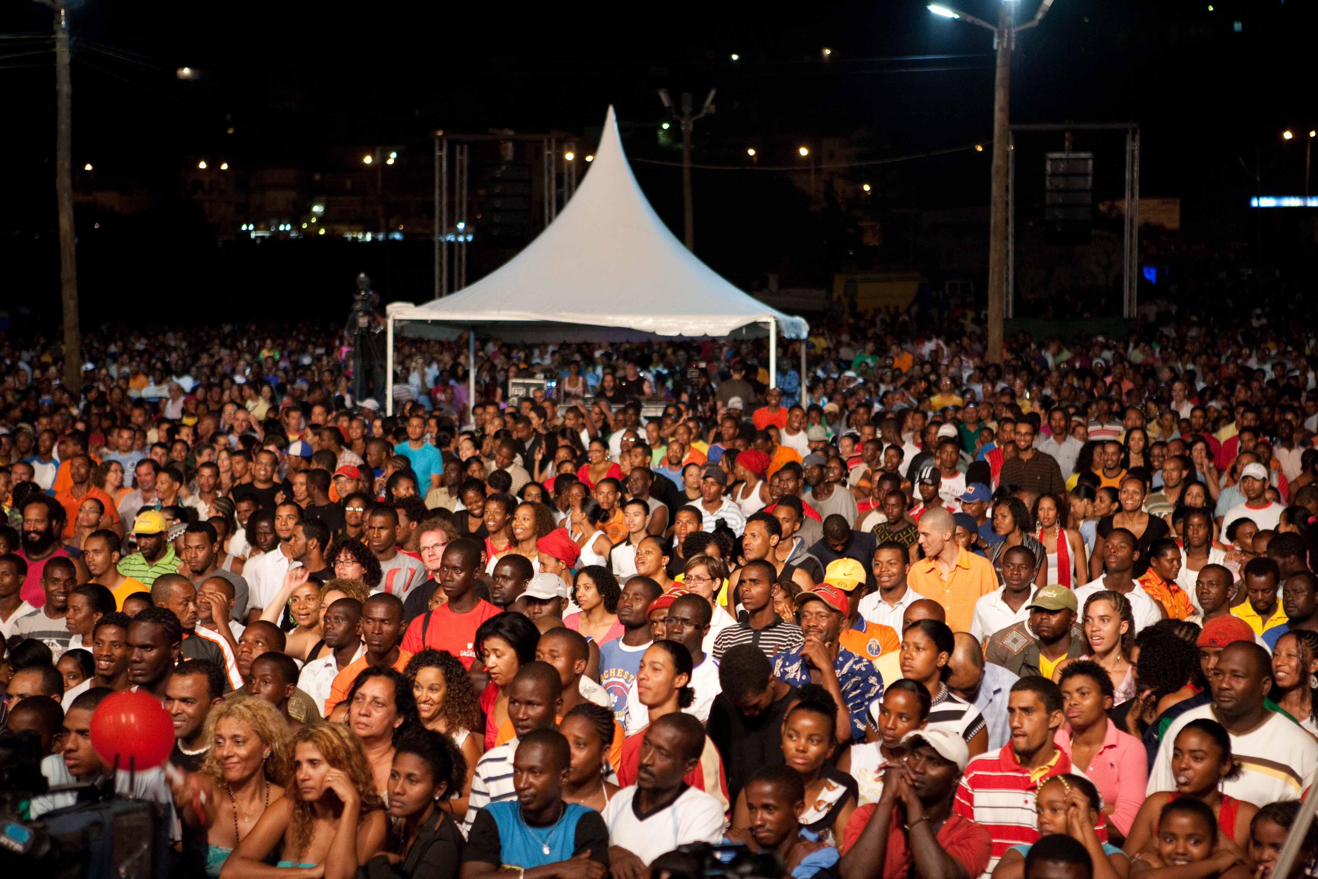 Espetáculo Musical com a participação de artistas dos dois países, no âmbito das comemorações dos 550 anos do descobrimento e 35 anos de independência de Cabo Verde